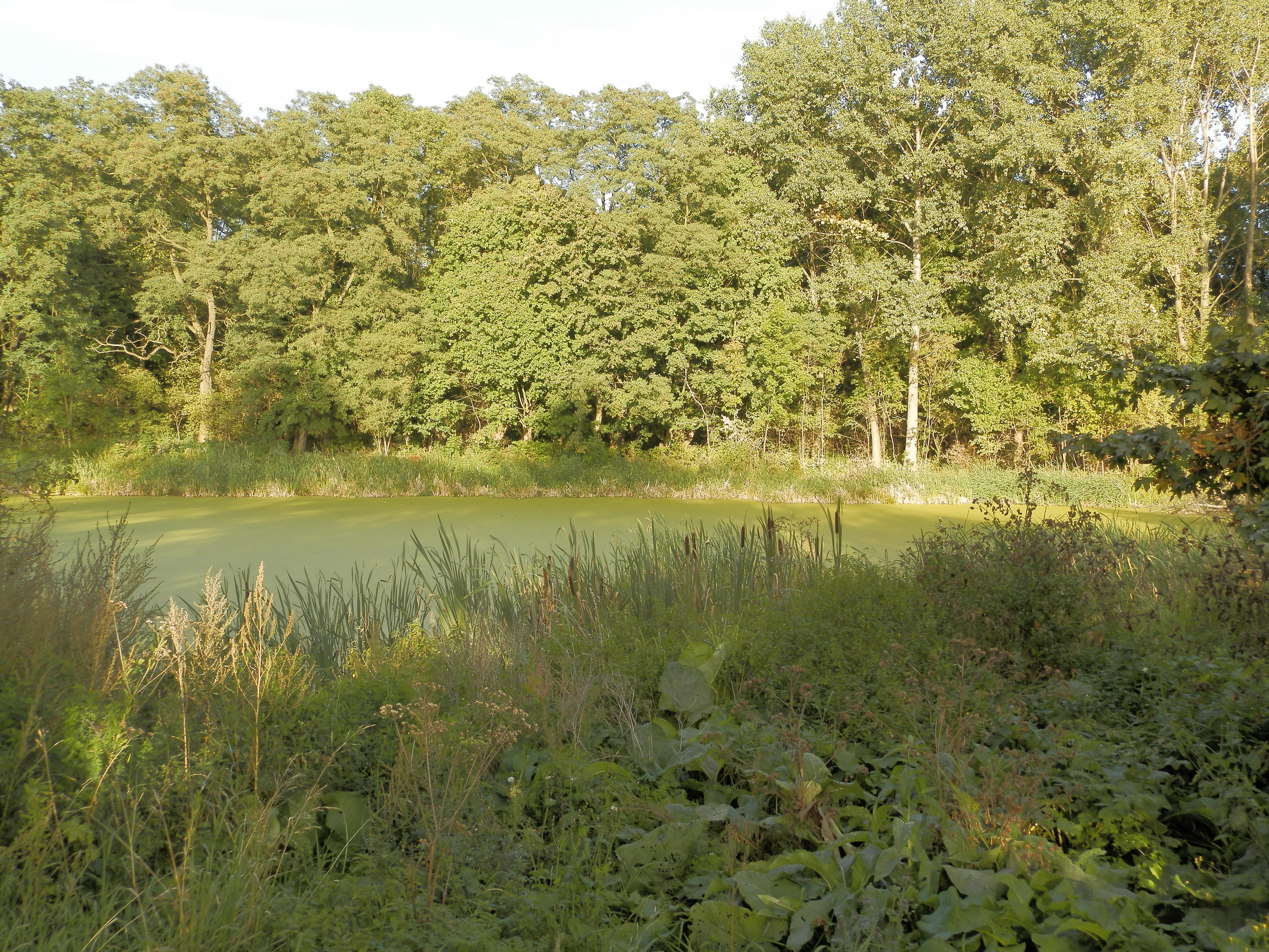 zespół dworski z XIX/XX w.: park Bierzwienna Długa, Kłodawa